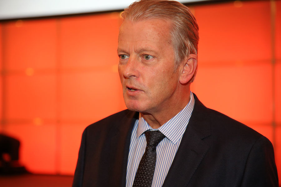 BM Dr. Reinhold Mitterlehner-4857